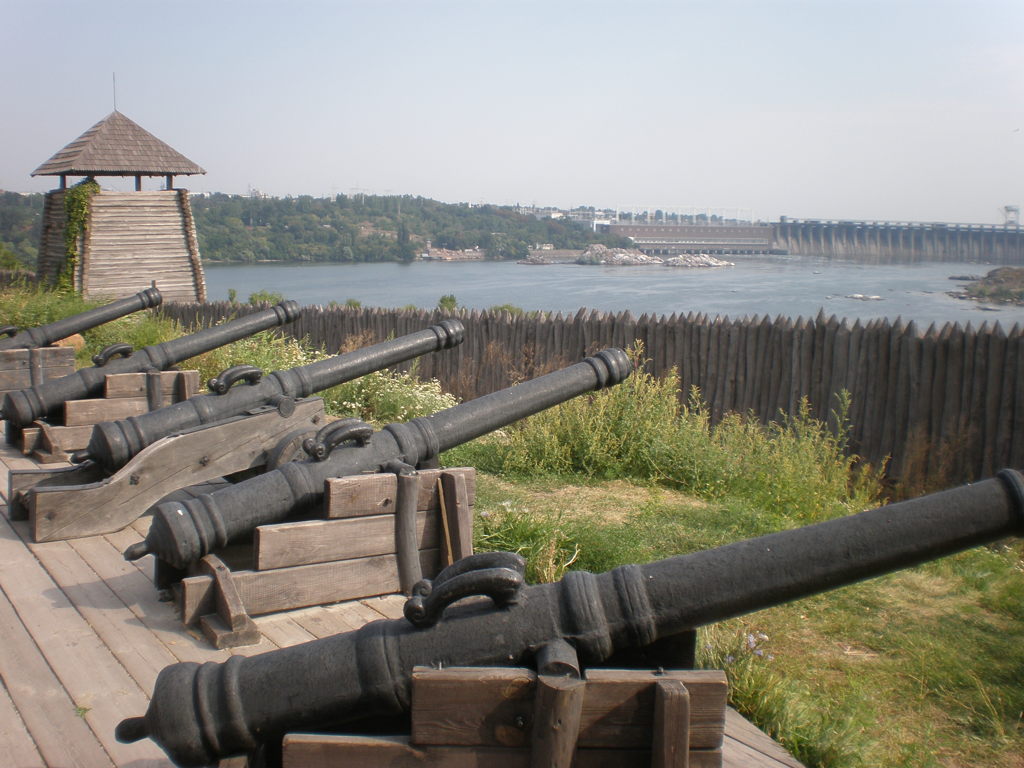 «Дніпровські пороги», м. Запоріжжя, о. Хортиця, о. Байда та скелі посеред р. Дніпро